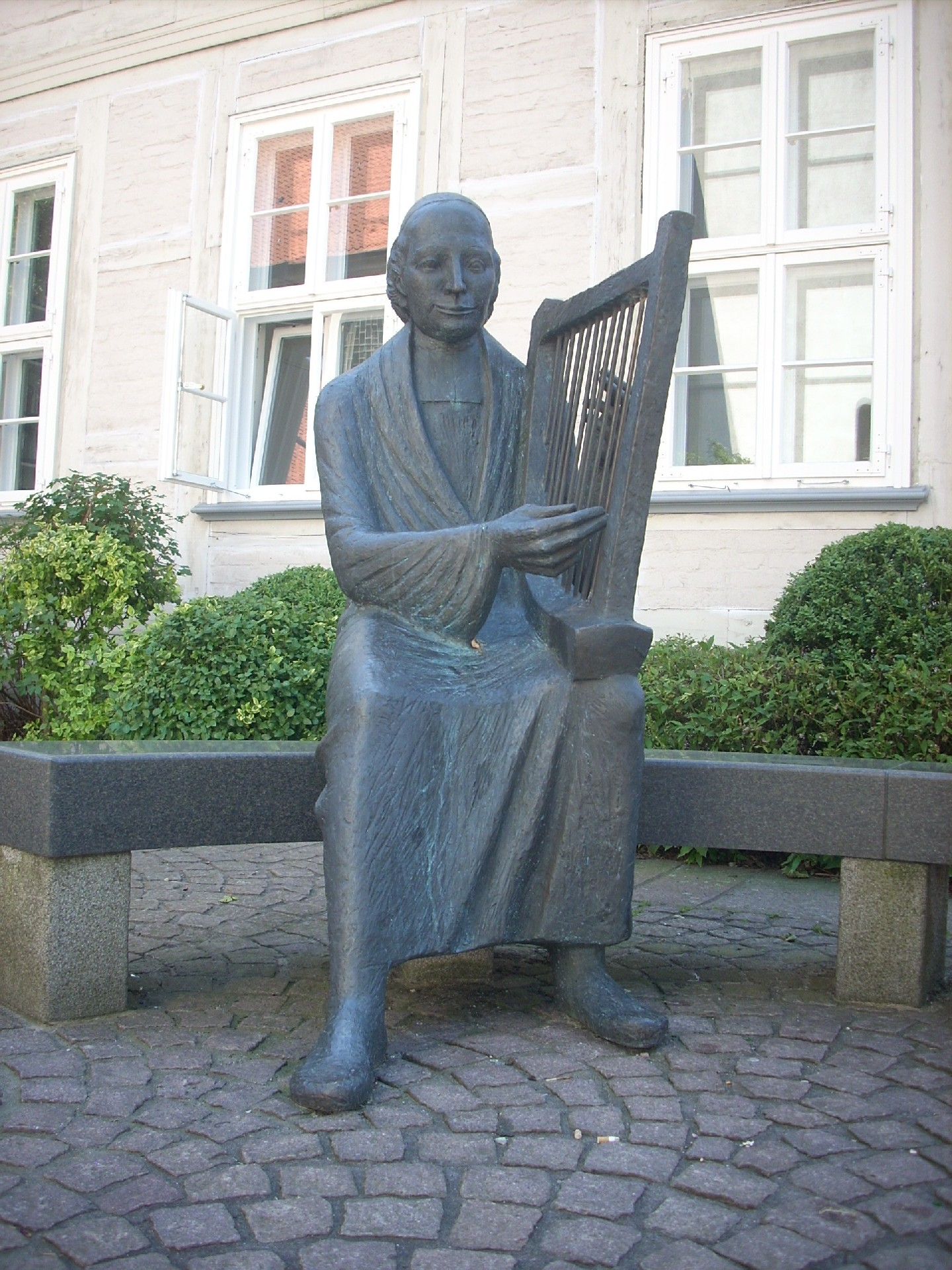 Burgdorf (Region Hannover), Denkmal Philipp Spitta, Spittaplatz